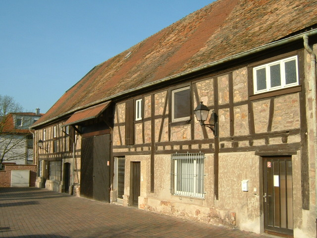 Zehntscheune mit Werkstatt und Verwaltung der Burgfestspiele in Bad Vilbel, town in Hesse. Here: Old house near the ancient water-castle.